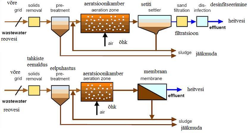 Klassikalise aktiivmudapuhasti (ülal) ja membraanbioreaktori (all) skeemid